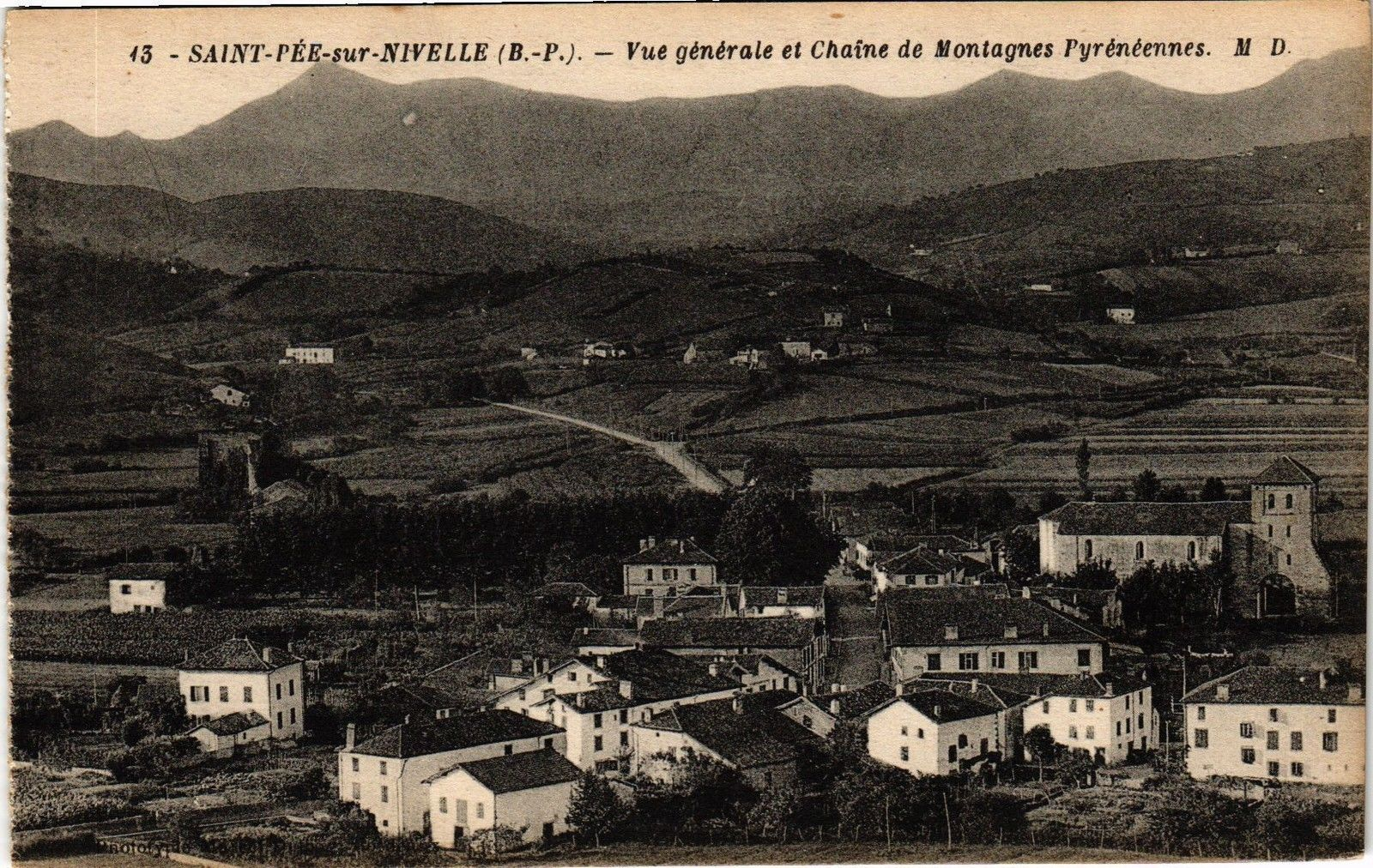 Saint-Pée-sur-Nivelle, vue générale 1920.